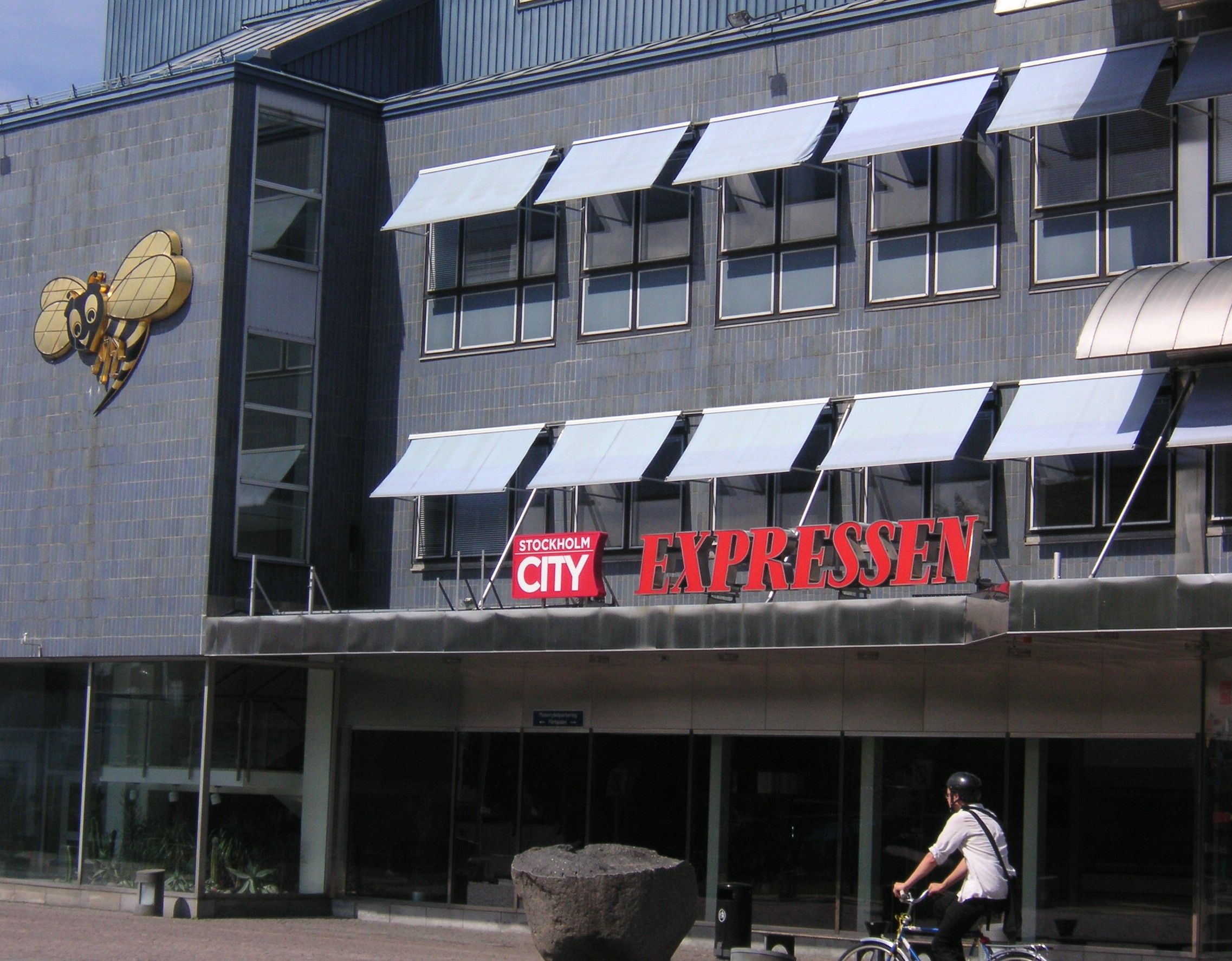 Expressens kontorsentré i Stockholm